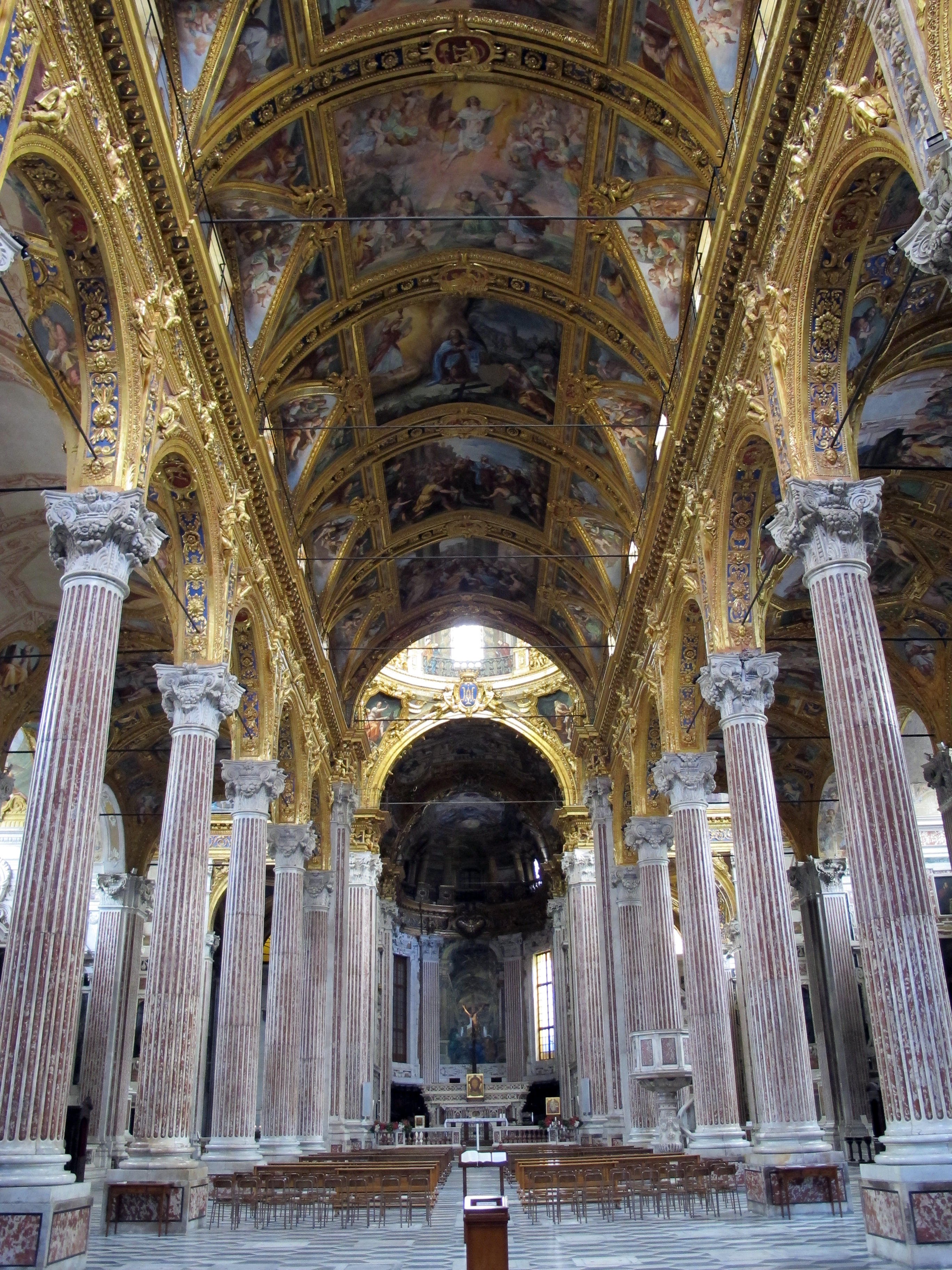 Genova, Liguria